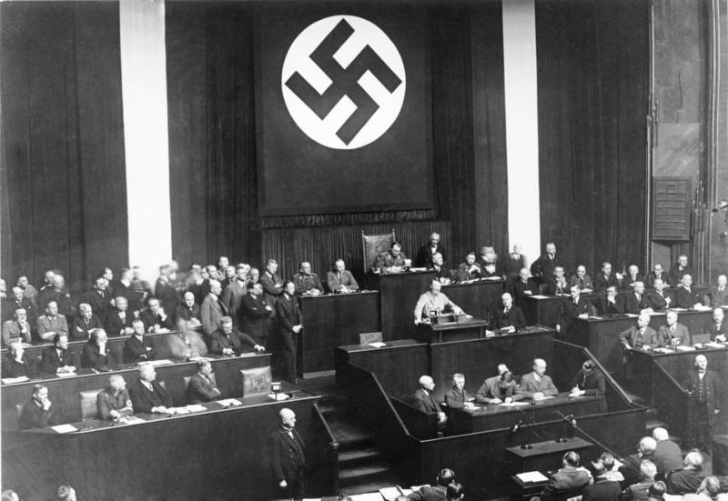 Reichskanzler Adolf Hitler, bei der Begründung des Ermächtigungsgesetzes im neuen Reichstag in der Krolloper am Königsplatz in Berlin! Reichskanzler Adolf Hitler während seiner großen Rede über das Ermächtigungsgesetz im neuen Reichstag. Rechts im Bilde die Regierungsbank.